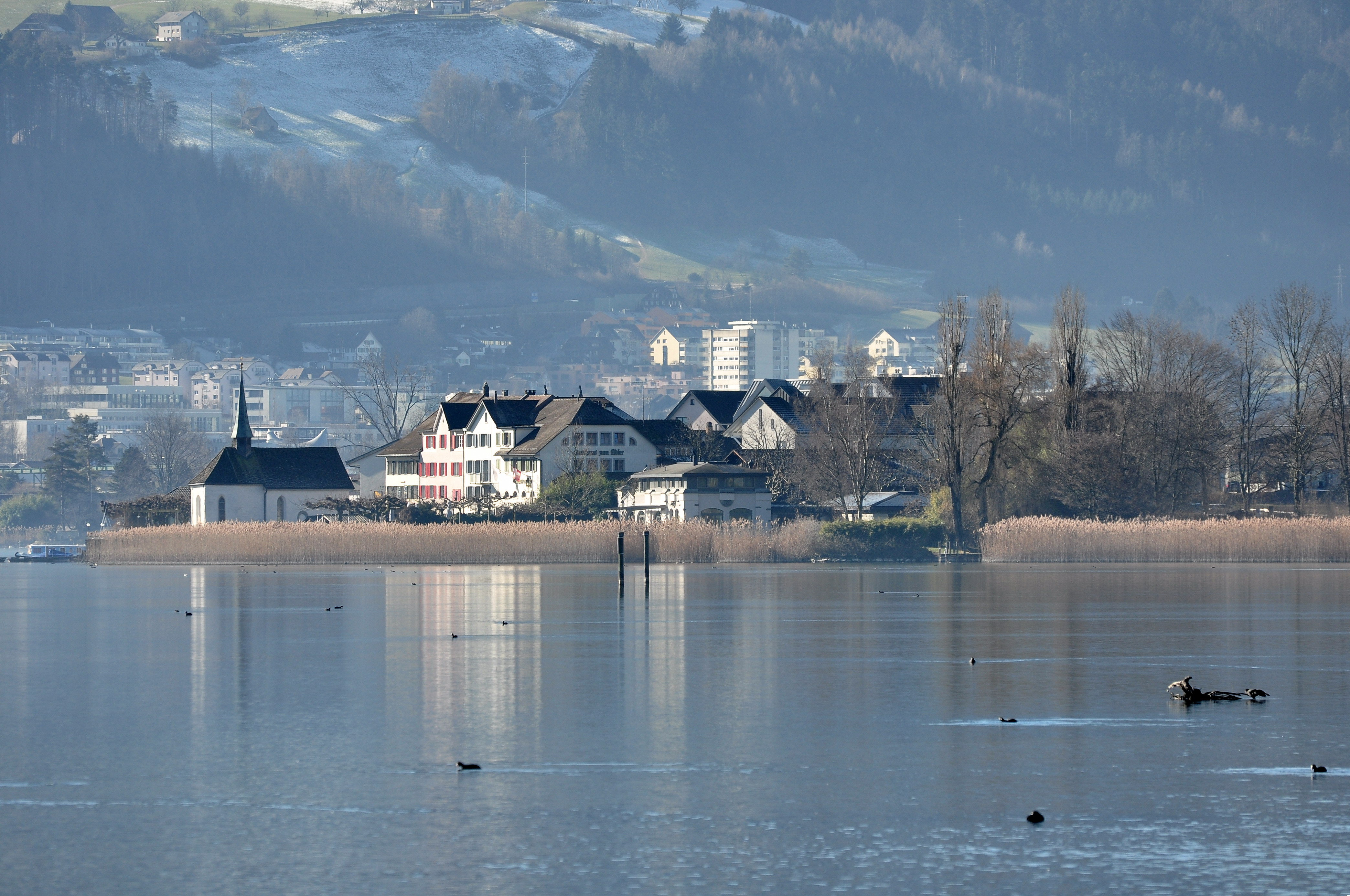 Hurden and Obersee (upper Lake Zürich) in Switzerland as seen from Rapperswil